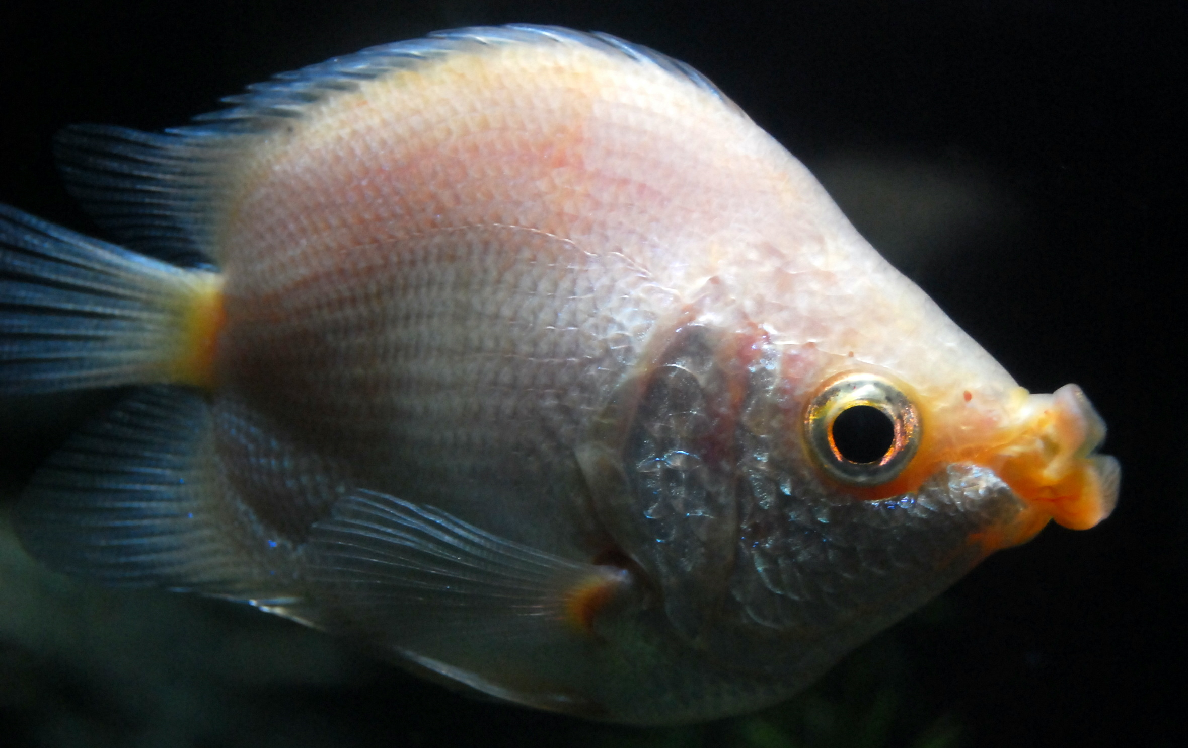 北京海洋馆中的接吻鱼